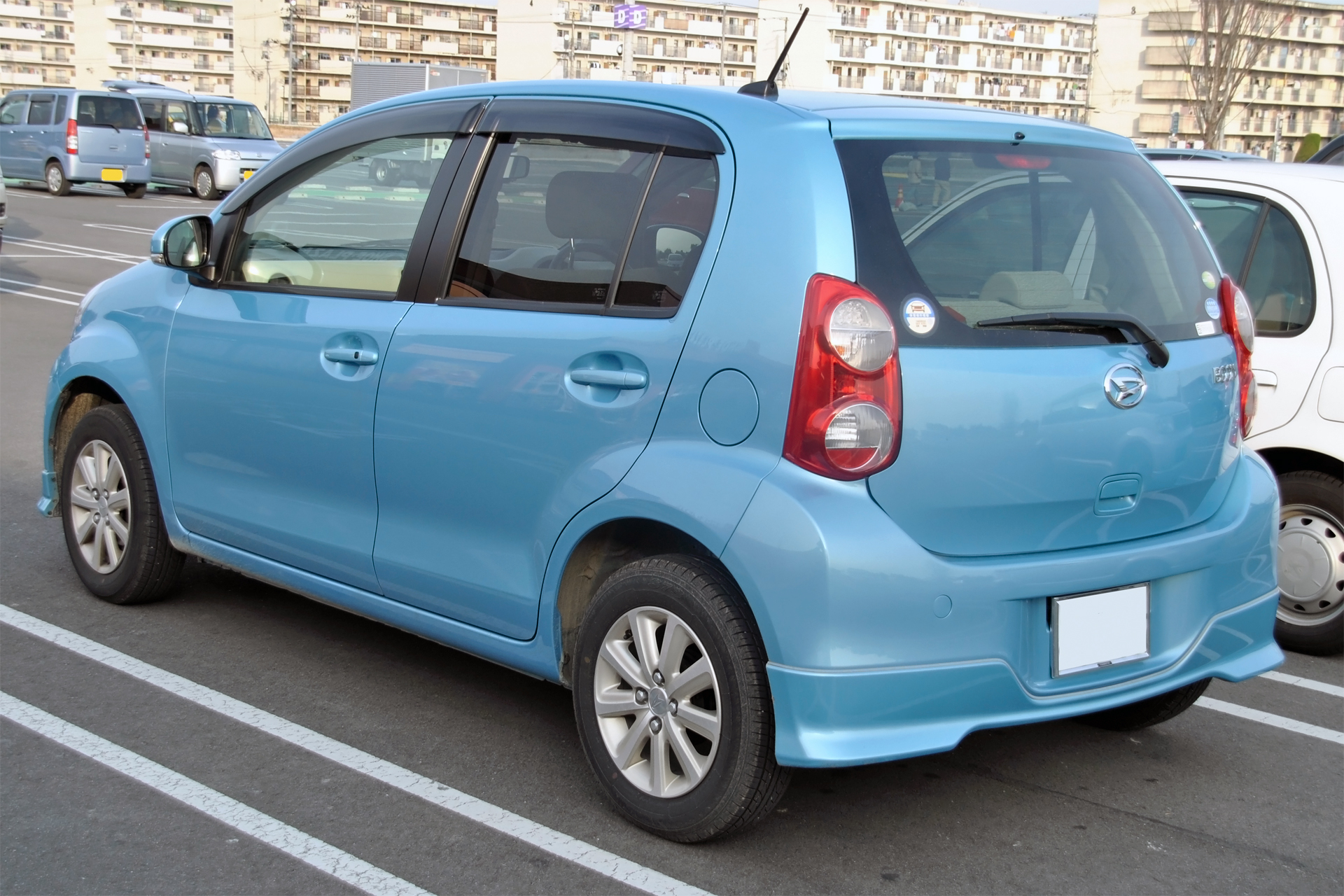 2nd_Daihatsu_Boon